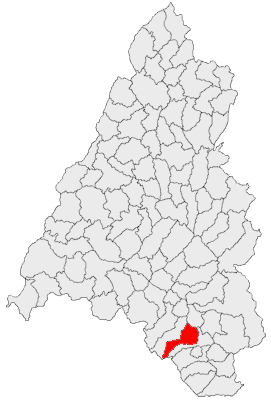 Categorie:Hărţi ale judeţului Bihor